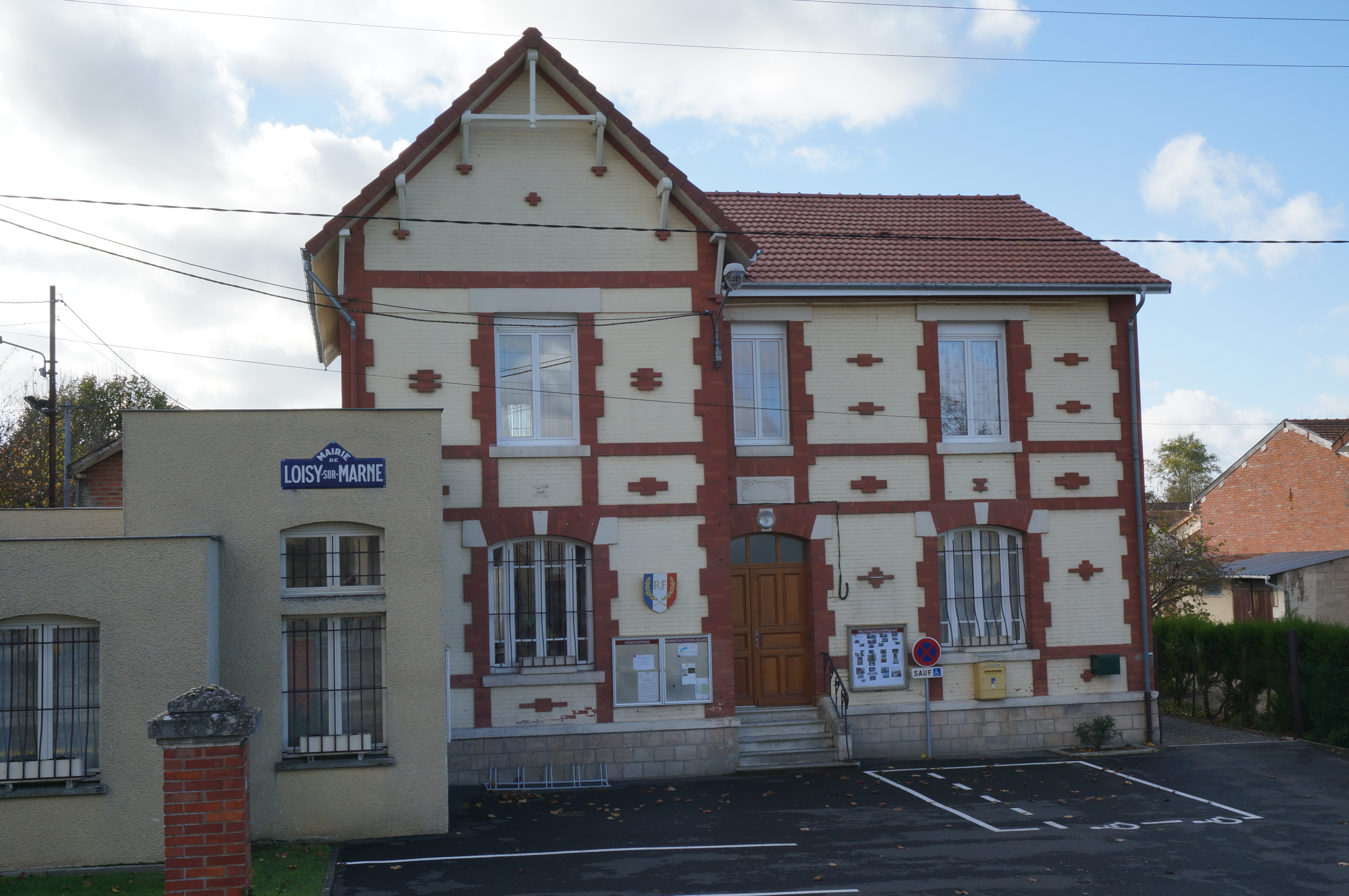 Vue de la mairie .